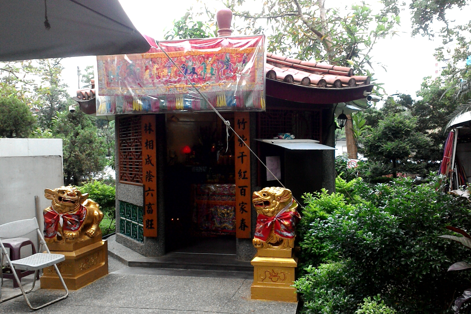 台灣大學土地公廟,台北市大安區學府次分區學府里